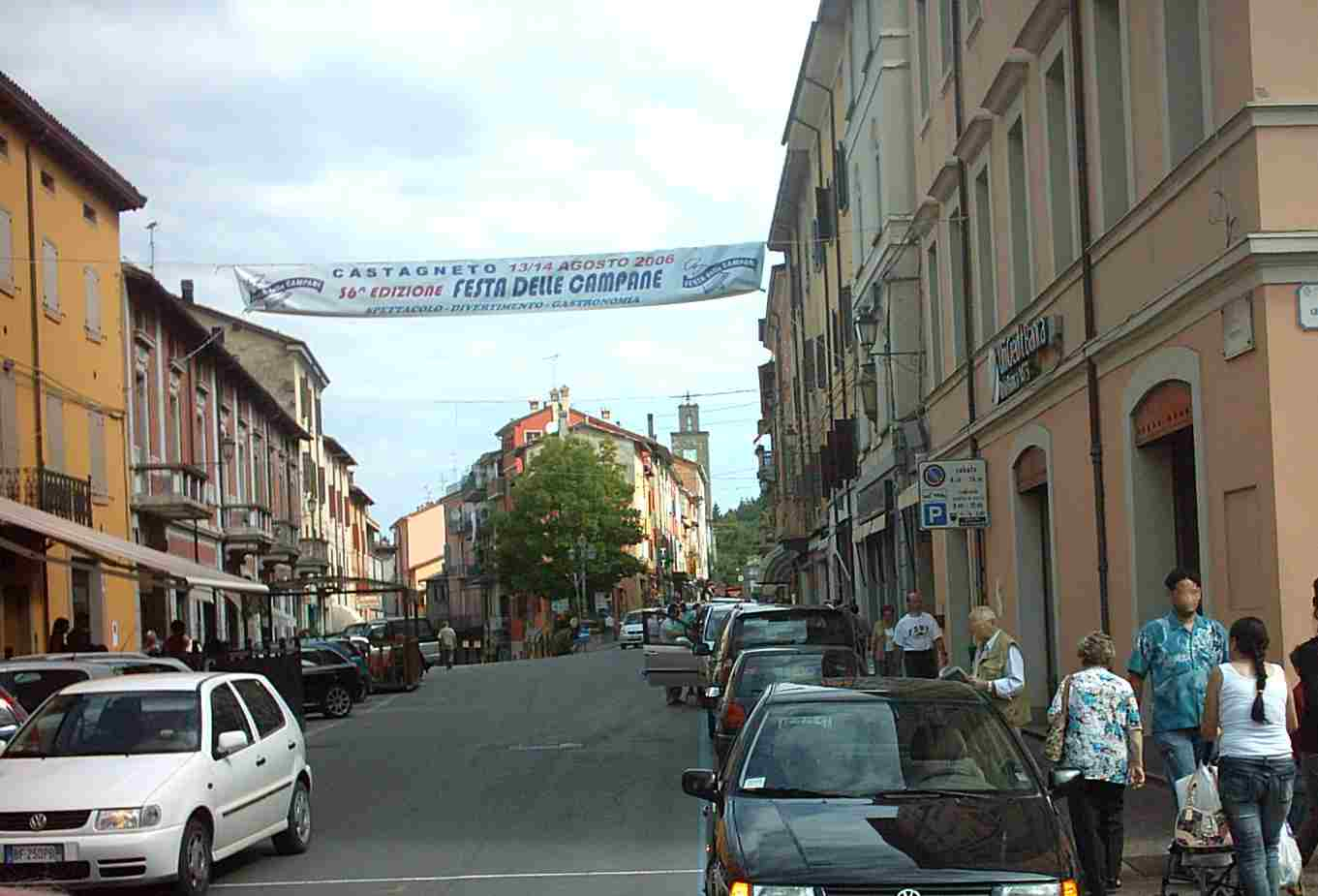 Pavullo nel Firignano (Mo) Italy, Via Giardini